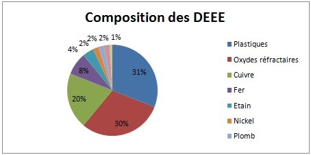 Ils sont constitués d'une quantité importante de métaux lourds.